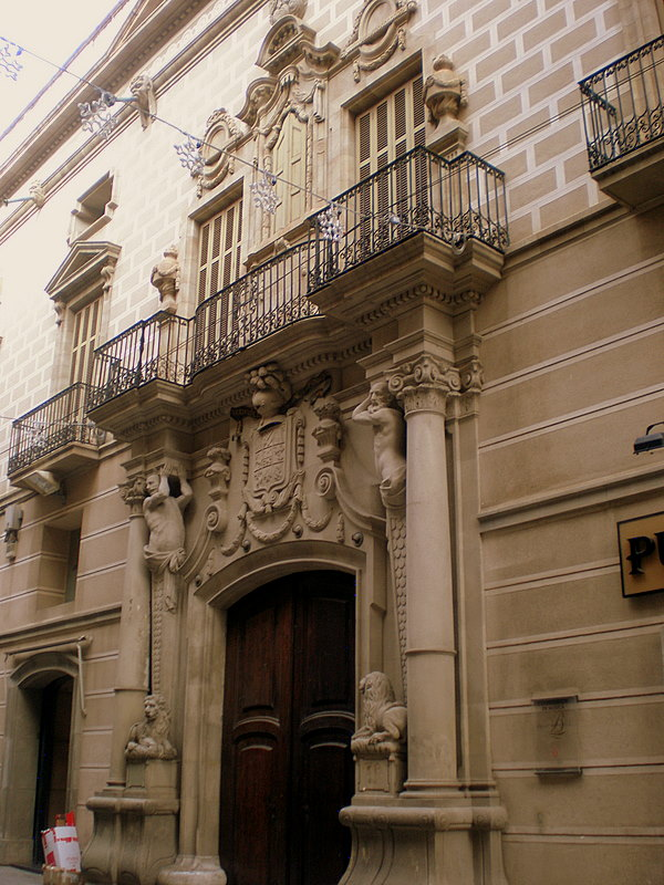 Reus - Palau Bofarull al carrer Llovera